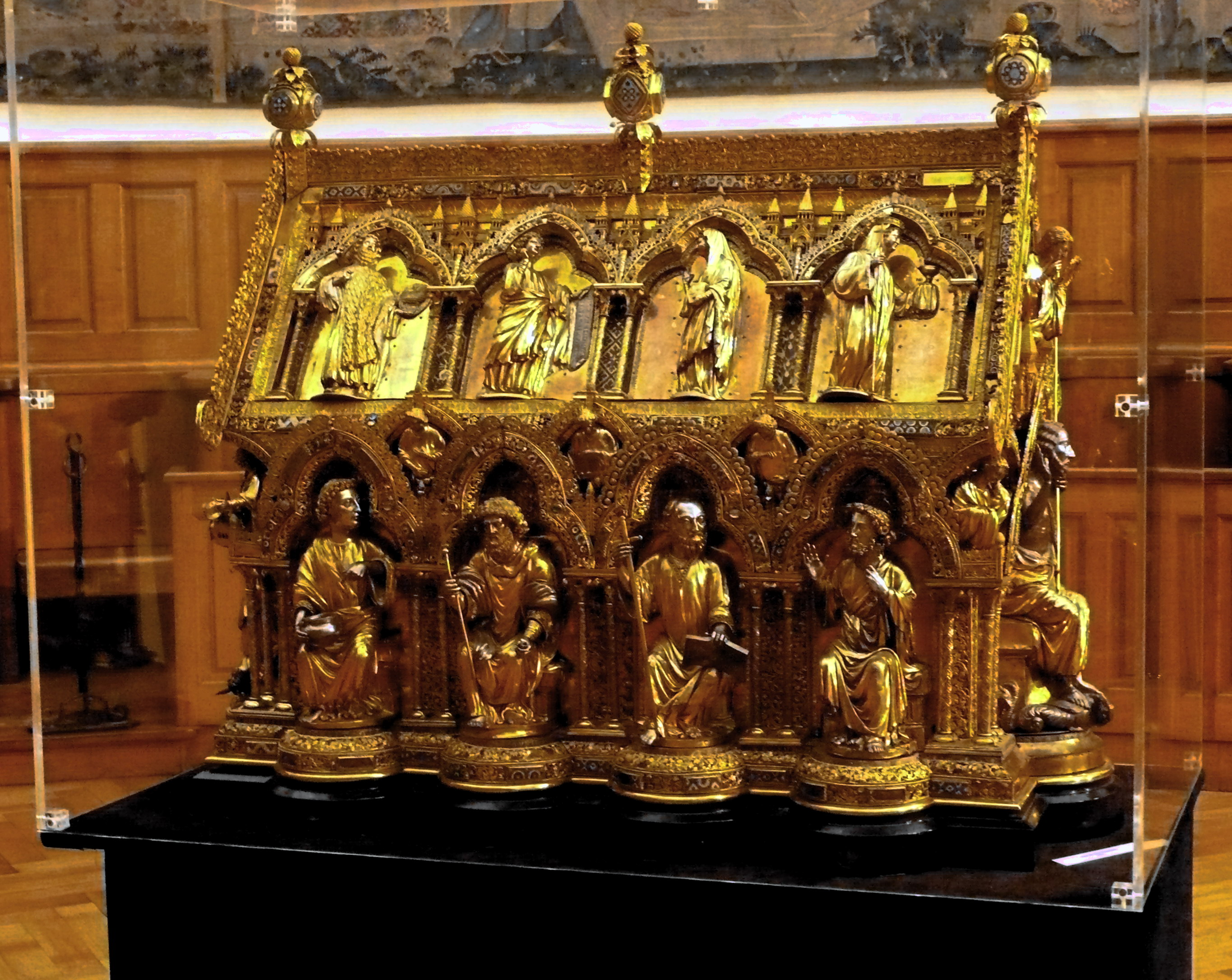 Tournai (Belgique), Cathédrale Notre-Dame, Châsse de Saint-Éleuthère